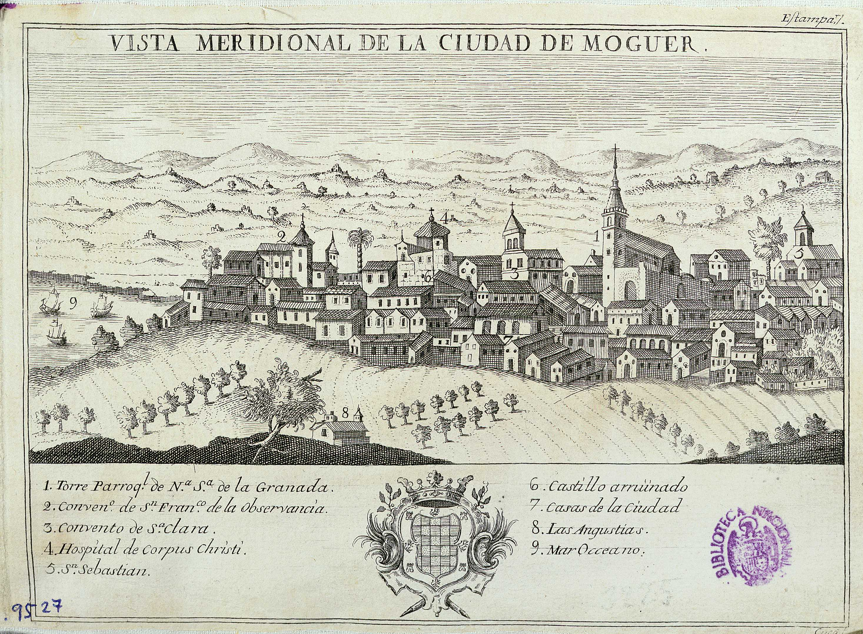 Vista de Moguer de 1795. (Pascual Cuco. Bernardo Espinalt y García)